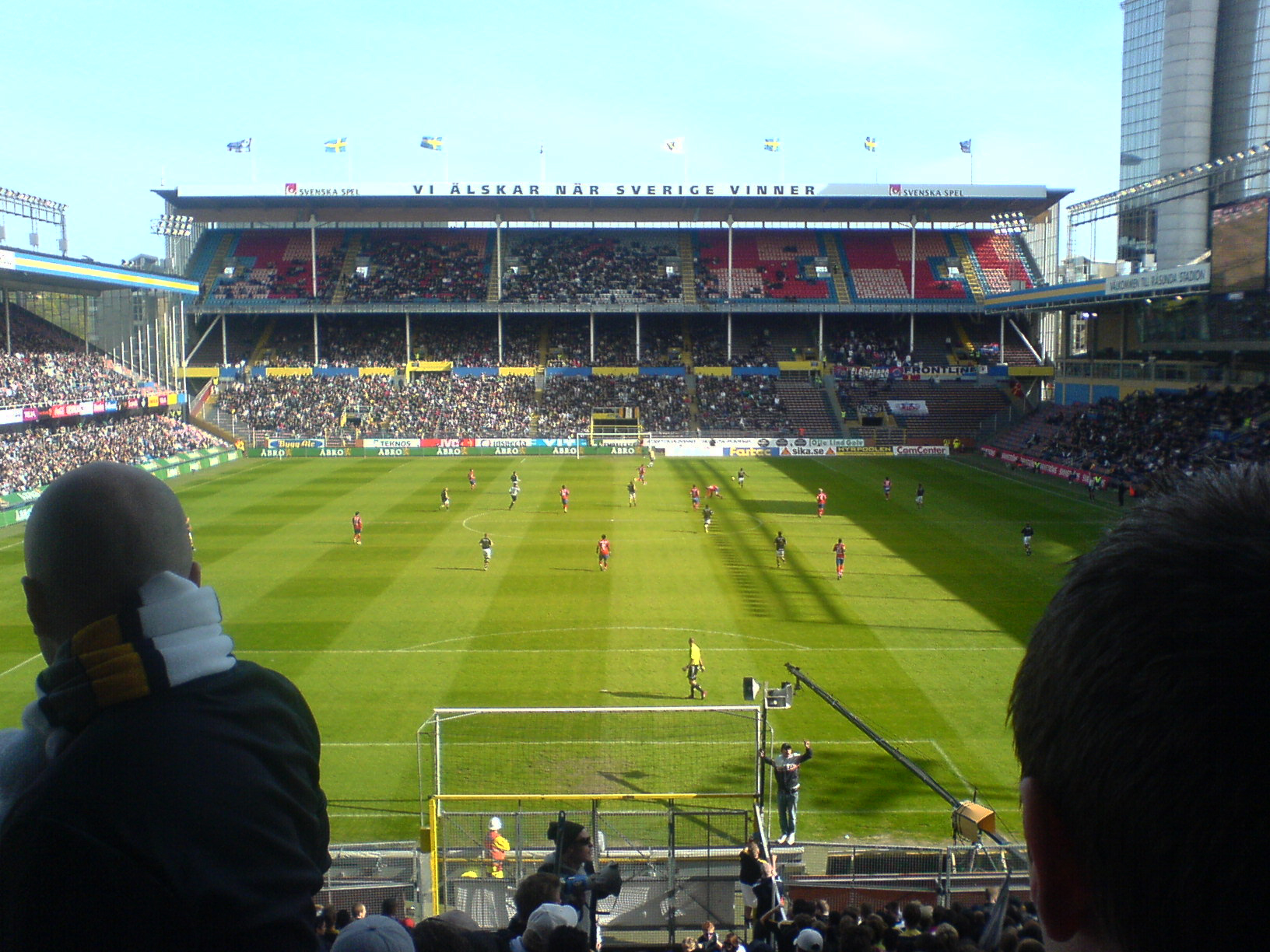 Södra Läktaren during the Fotbollsallsvenskan match between AIK and Helsingborgs IF (0-1). Taken from Norra Stå